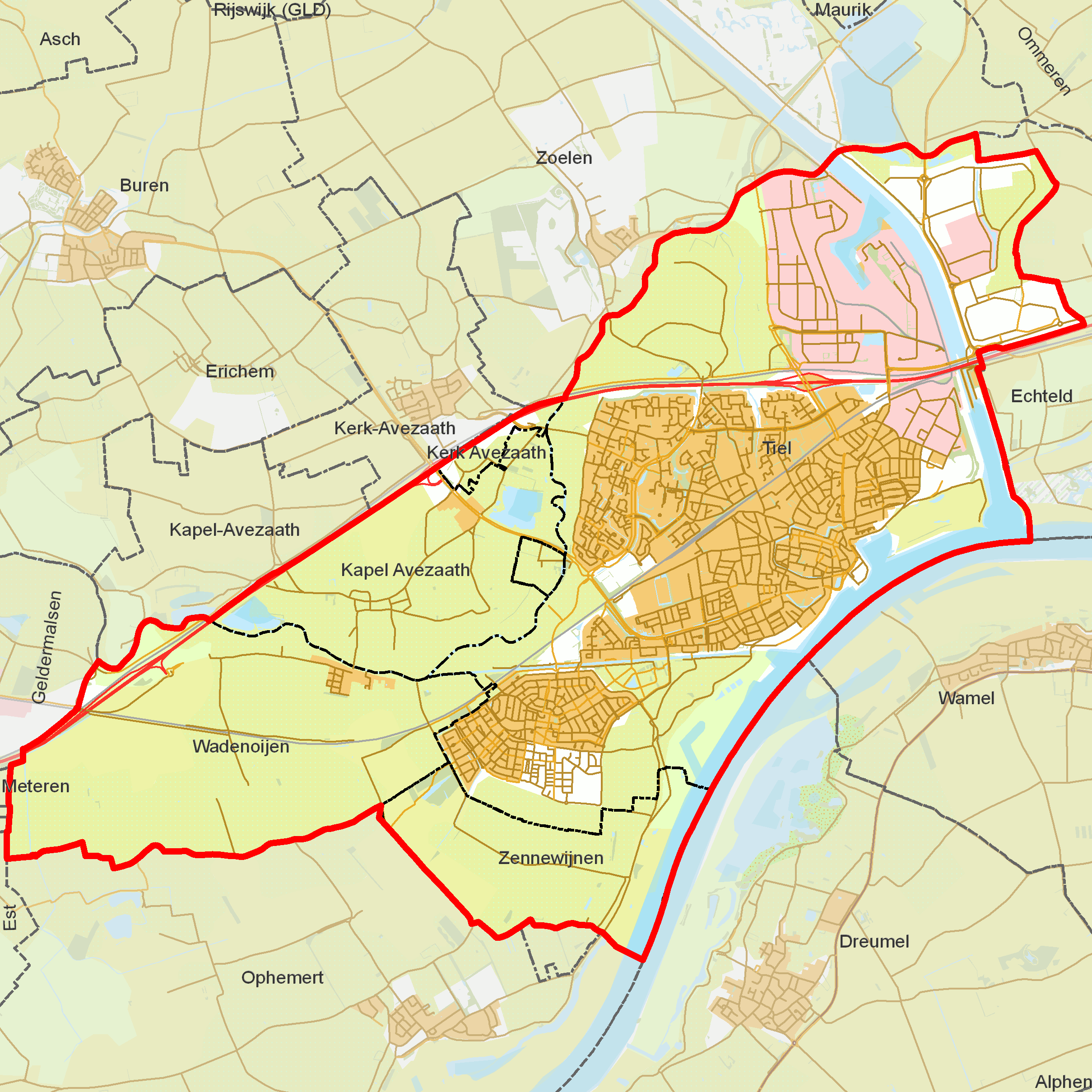 BAG woonplaatsen - Gemeente Tiel.png